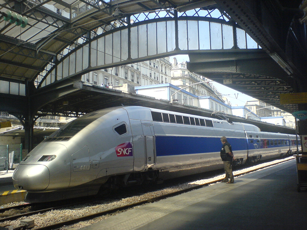 Paris Gare de l'Est TGV POS